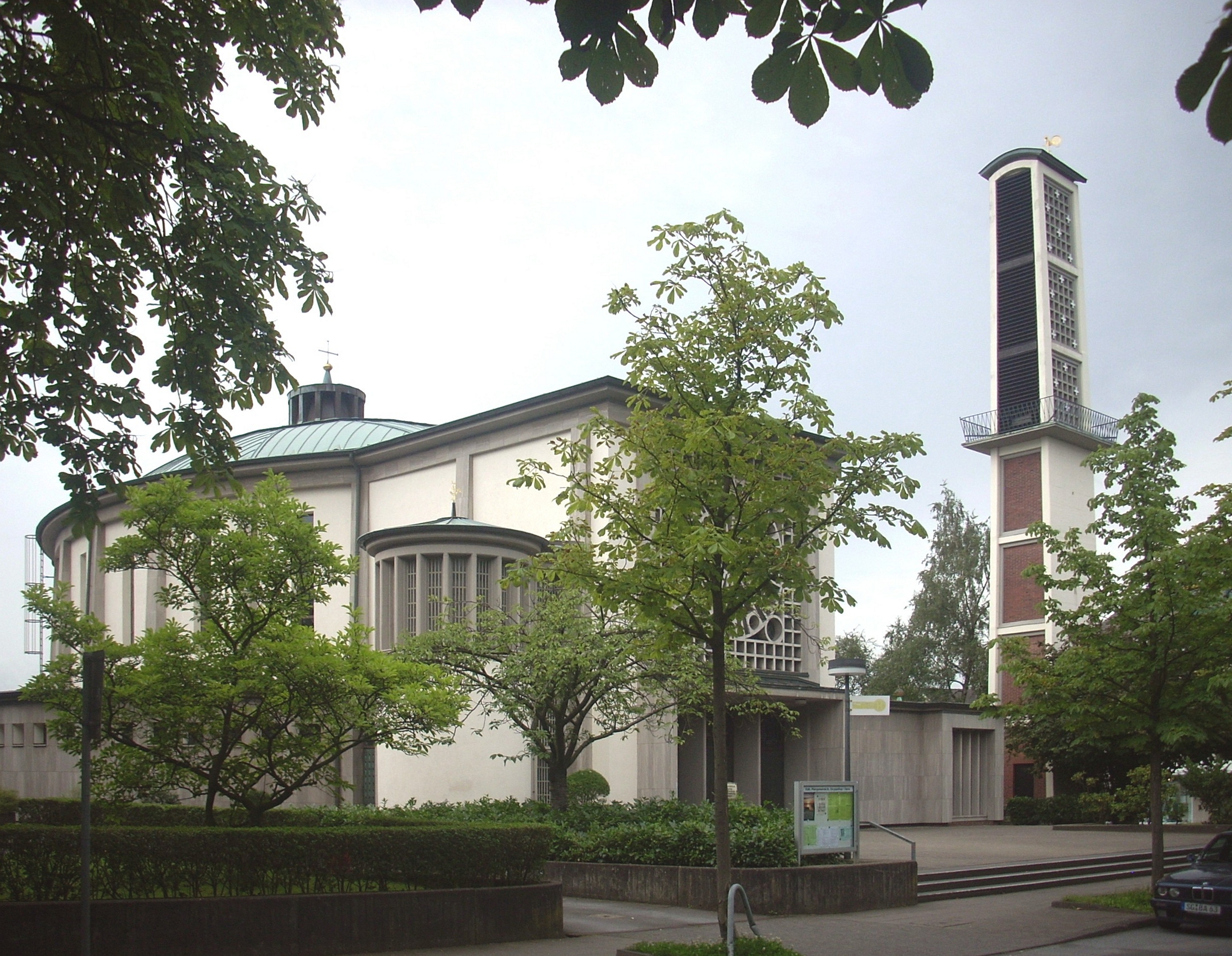 Haan, Kath. Kirche St. Chrysanthus und Daria